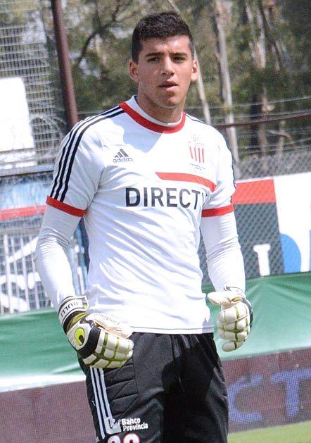 El arquero de Estudiantes en el día del clásico platense version 2014 ante Gimnasia de visitante en El Bosque. 16/03/2014